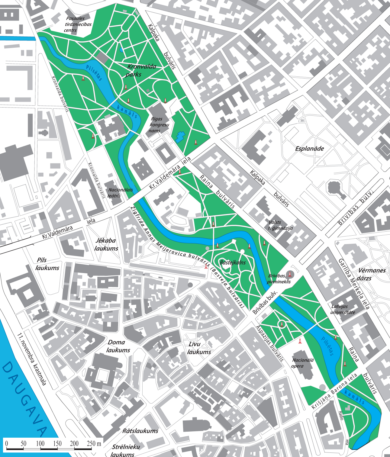 Kanālmalas apstādījumu Rīgā karte. Zīmējis A.Buks